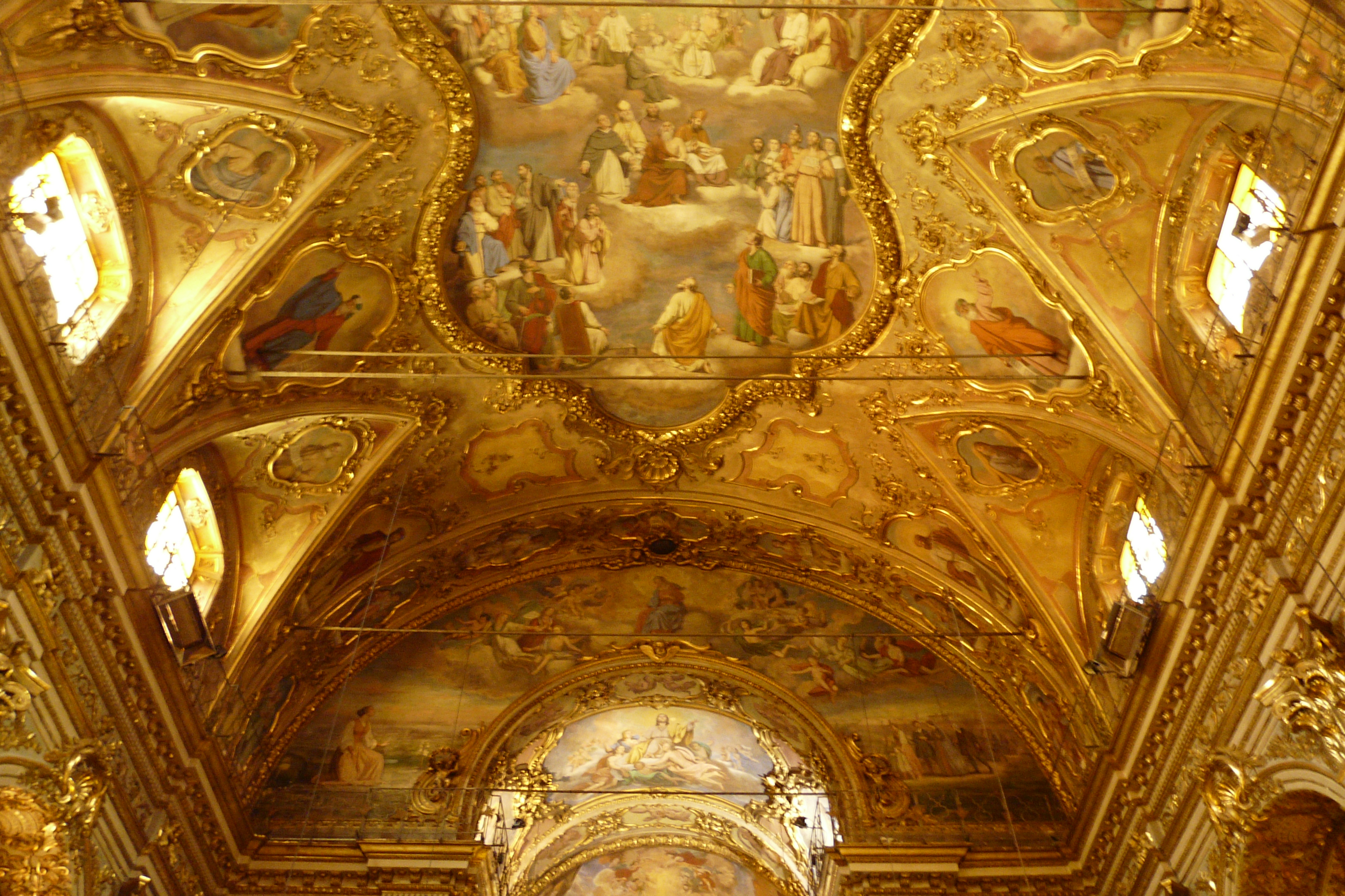 Chiesa di San Giacomo di Rupinaro, Chiavari, Liguria, Italia